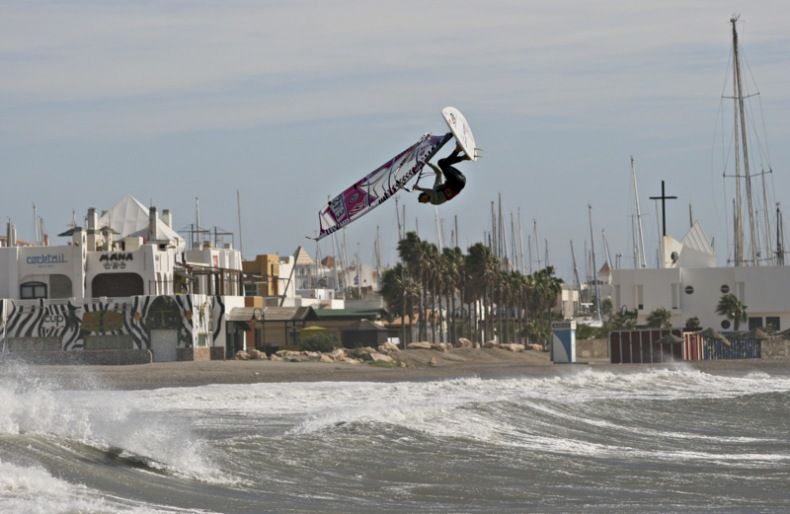 Backloop en Klub de Playa. Almerimar